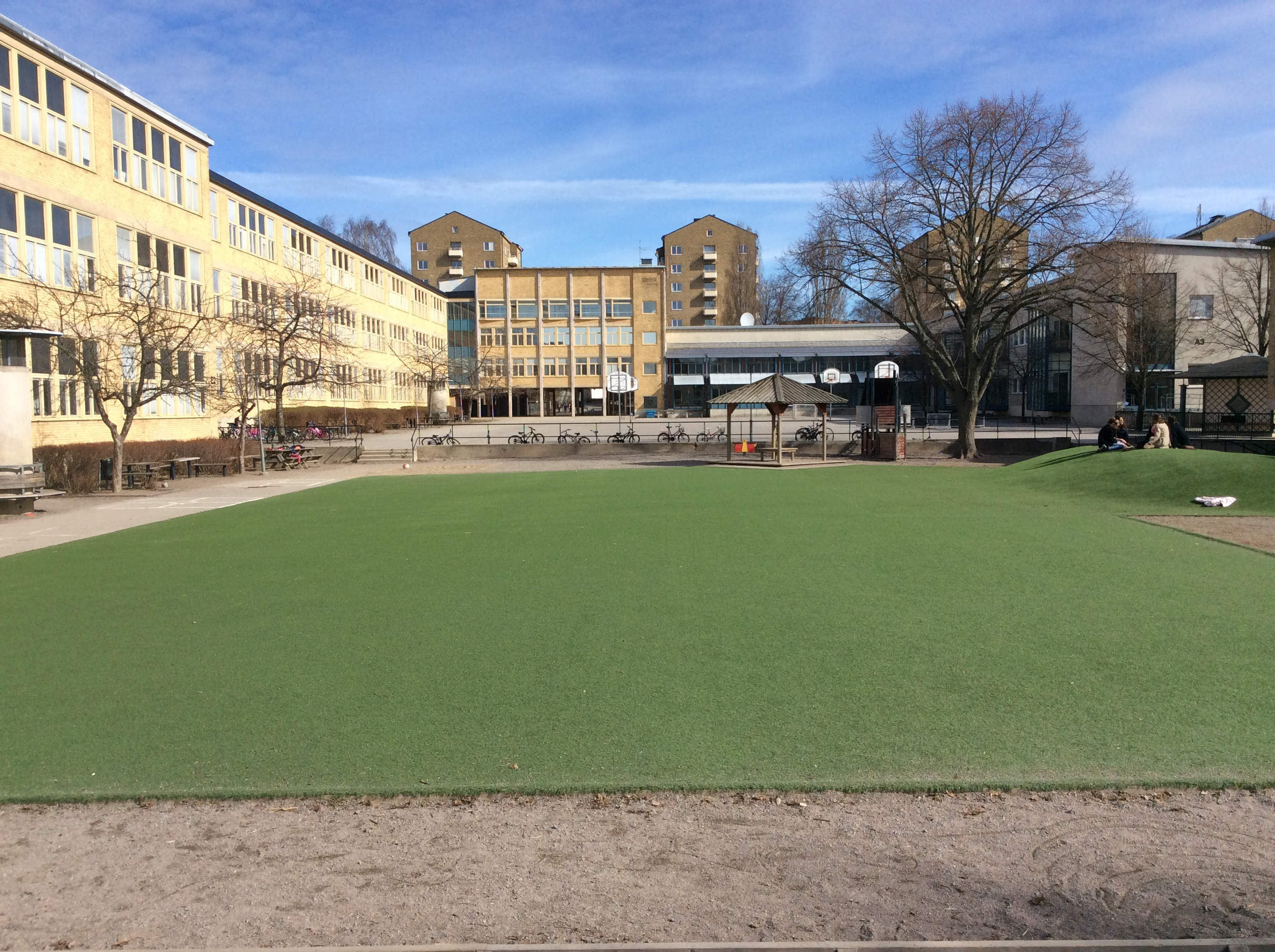 Skolgård